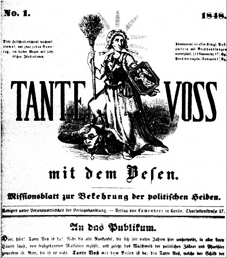 Pamphlet against "Vossische Zeitung", Berlin.